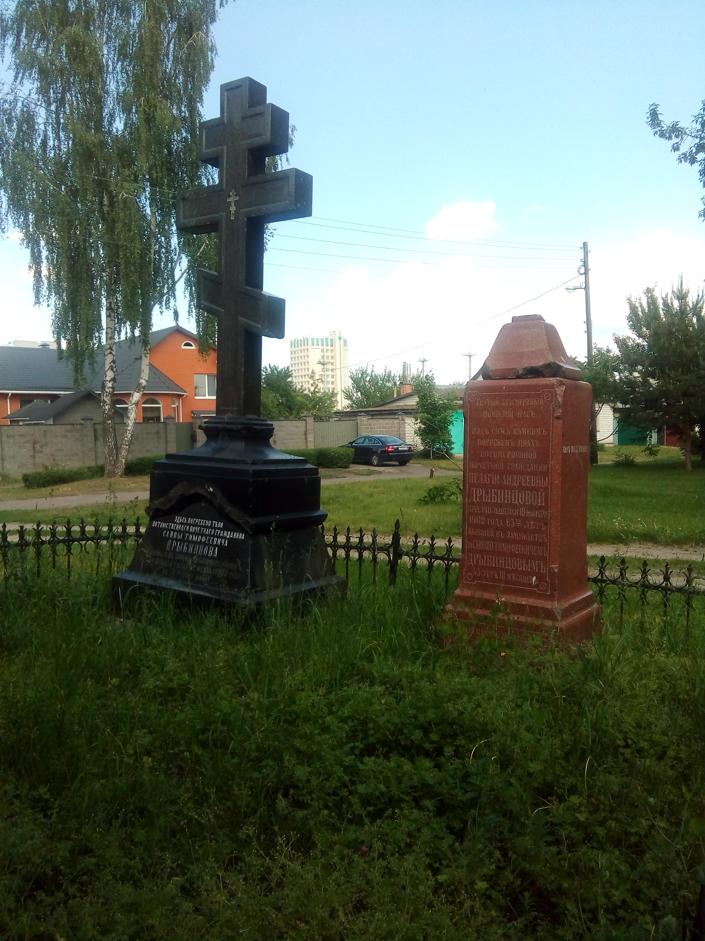 Могилы Саввы Тимофеевича Дрибинцева и его супруги на заброшеном кладбище Монастырька, исторического района города Гомеля.